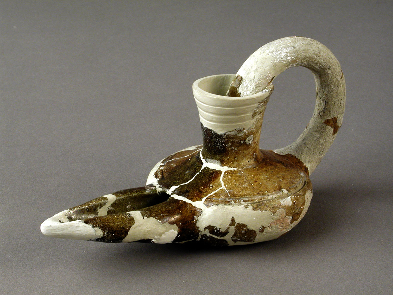 Candil época andalusí Museo Almeria